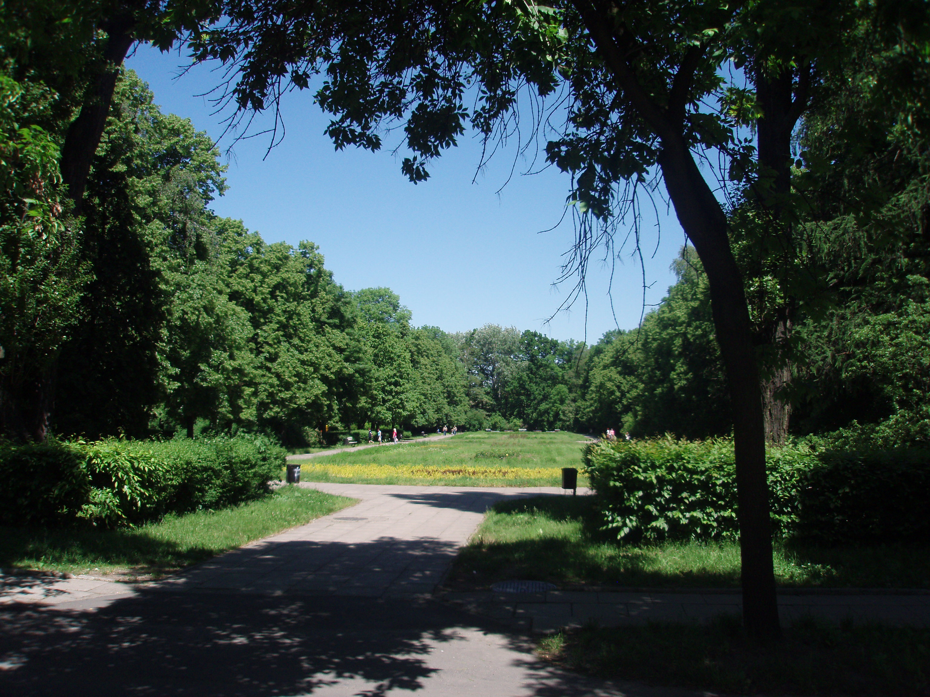 Park im. Legionów widok od ul. Sanockiej